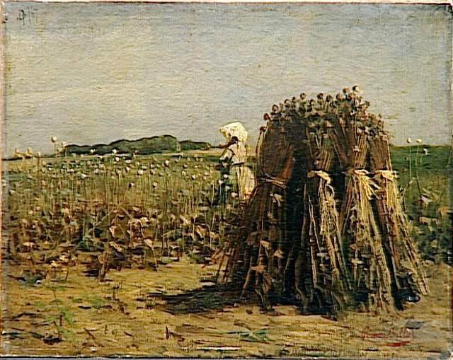 Billet Pierre (1837-1922) , Champ d’œillettes , 19° siècle , huile sur carton , Musée des Beaux-Arts de Lille, date non connue (19° siècle) Picard: Billet Pierre (1837-1922) , Pièche d’œillettes , 19° sièke , heule su carton , Musée des Biaus-Arts éd Lille